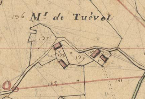 Moncles en el Cadastre napoleònic del 1812 (Arxius Departamentals dels Pirineus Orientals)